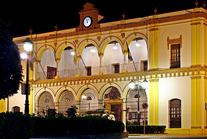 Fachada del Ayuntamiento de Moguer (Huelva)